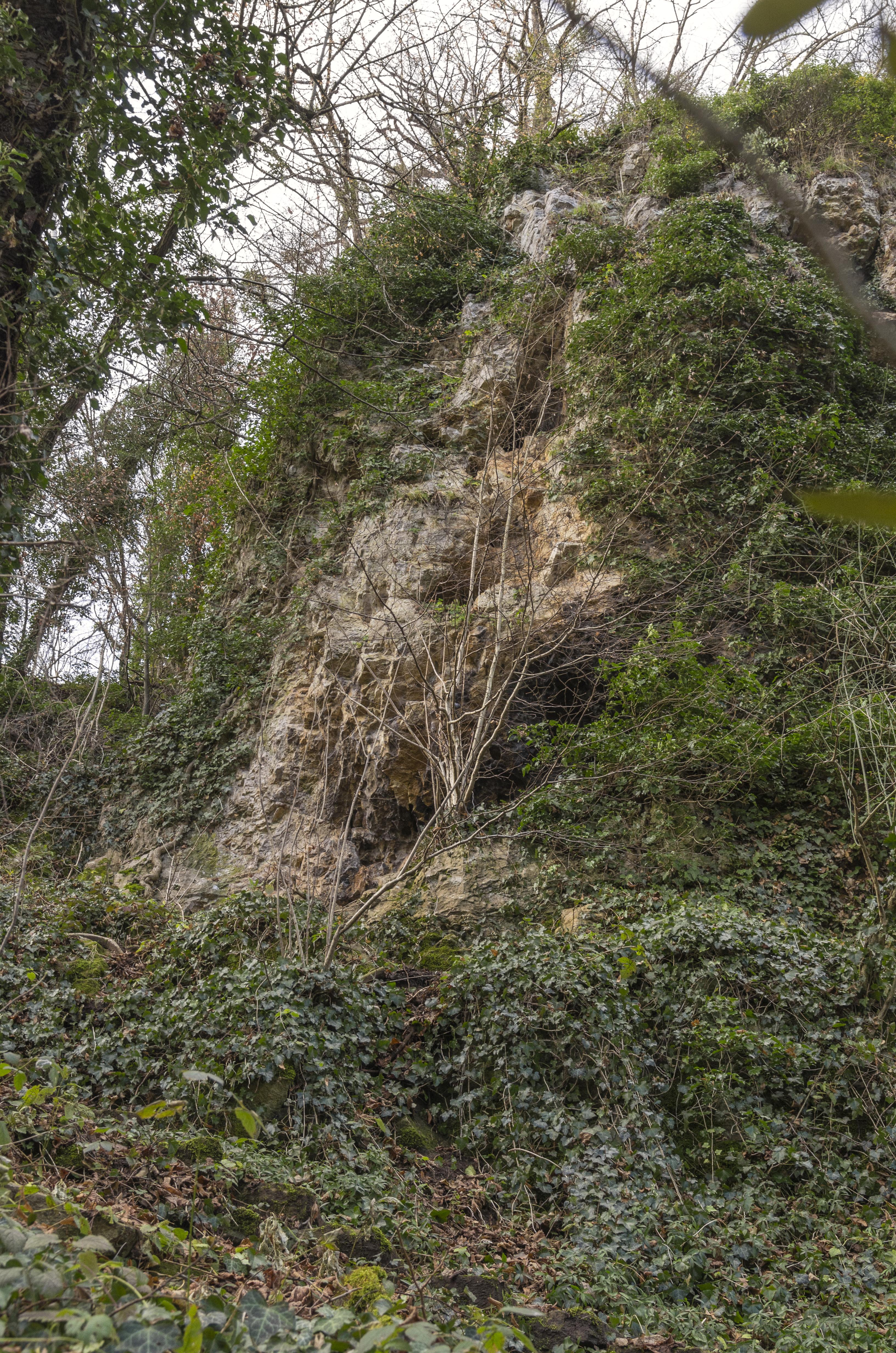 Landschaftsaufnahmen